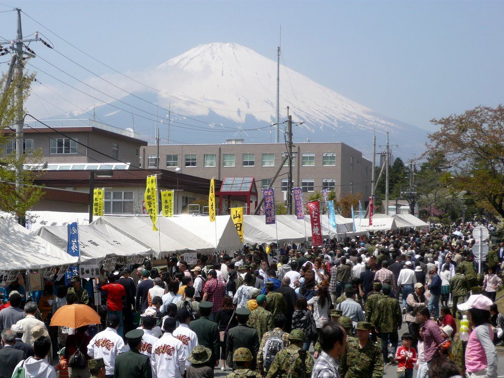 陸上自衛隊板妻駐屯地の2009年度開設記念行事。